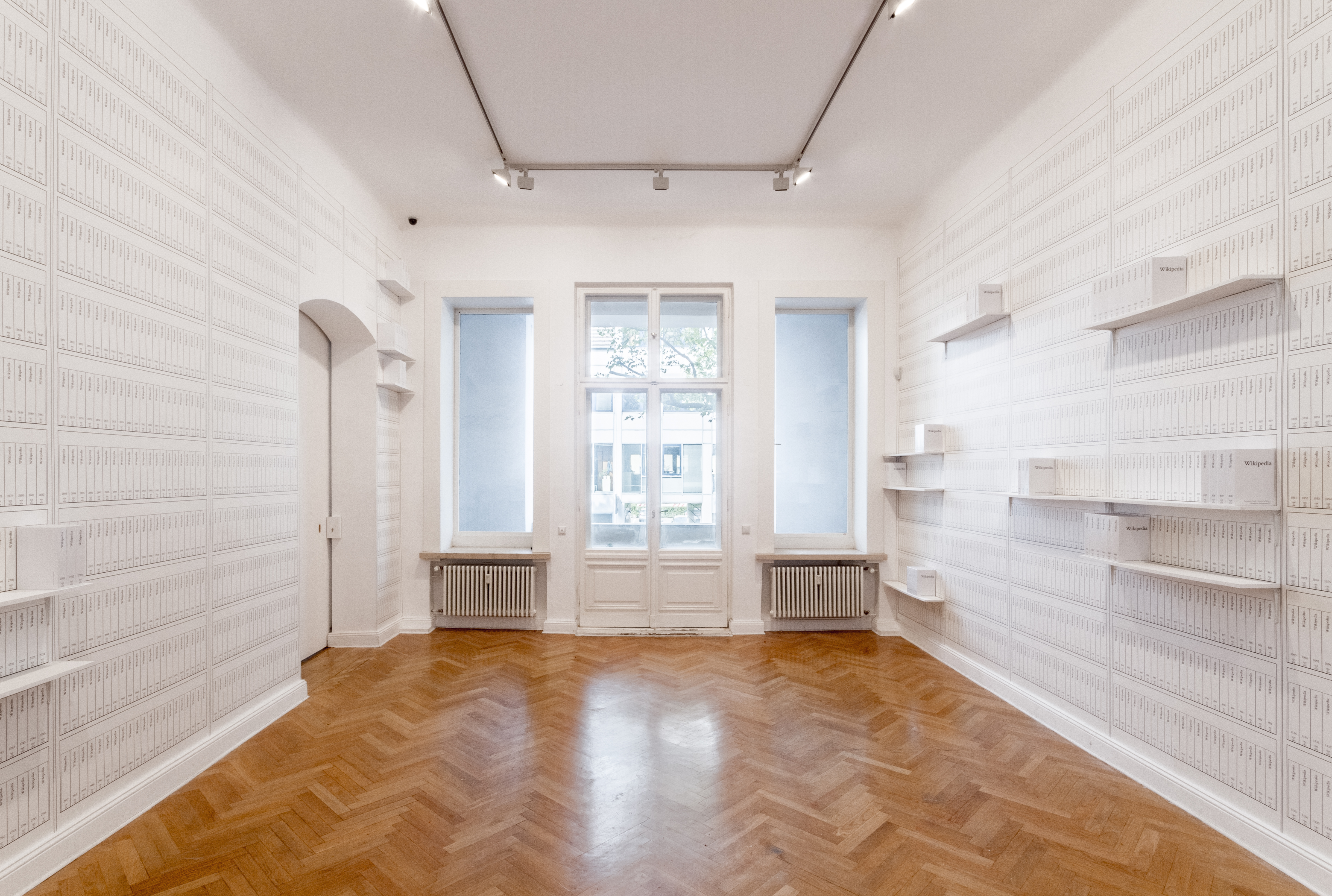 Ansicht der Ausstellung Print Wikipedia: from Aachen to Zylinderdruckpresse von Michael Mandiberg in der Gallerie Import Projects, Berlin